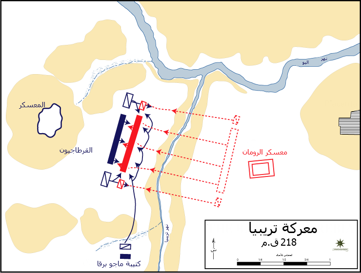 مُخطط معركة تريبيا بين الرومان والقرطاجيين بقيادة حنبعل برقا.